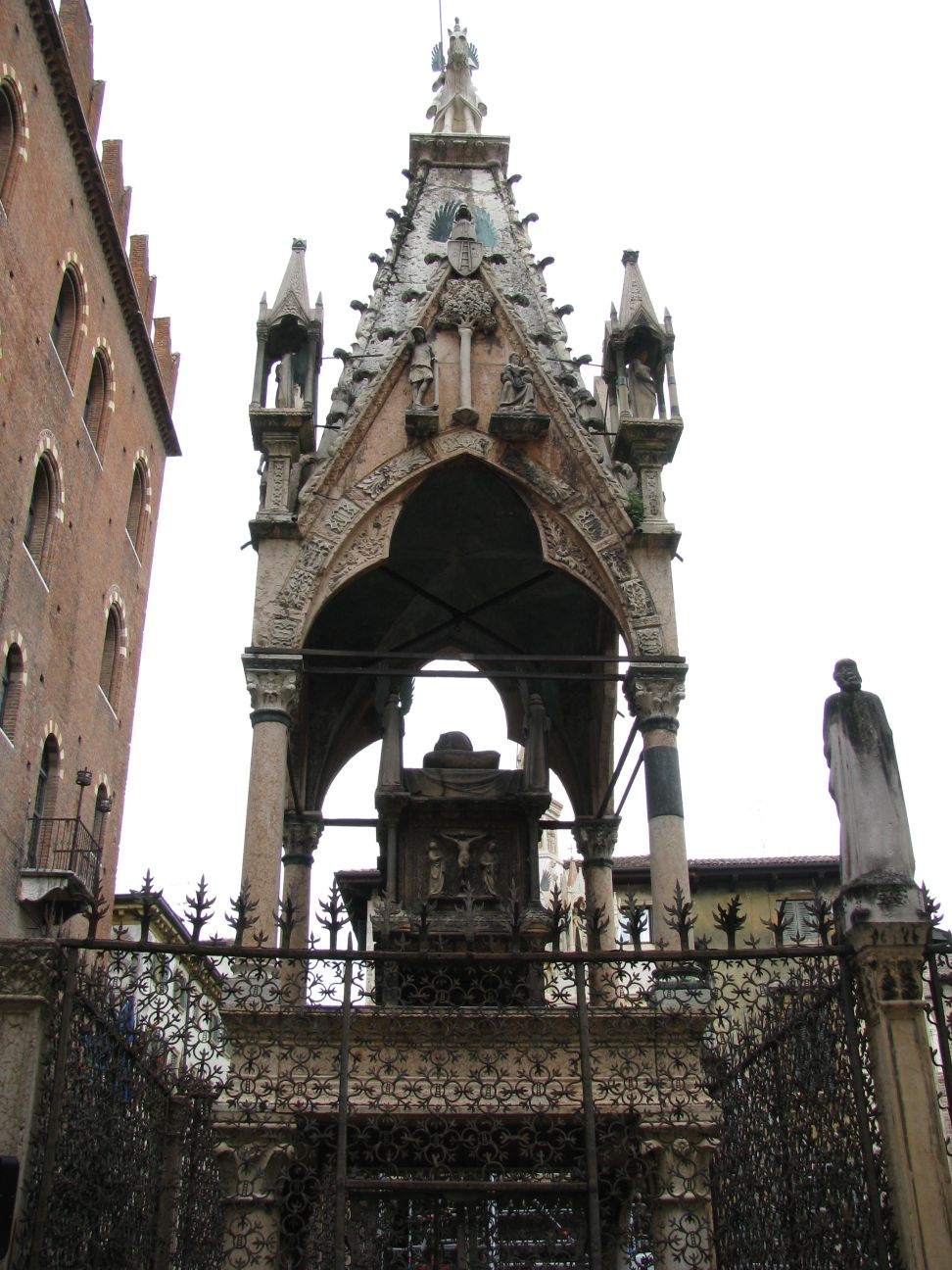 Arca Scaligera (Verona)